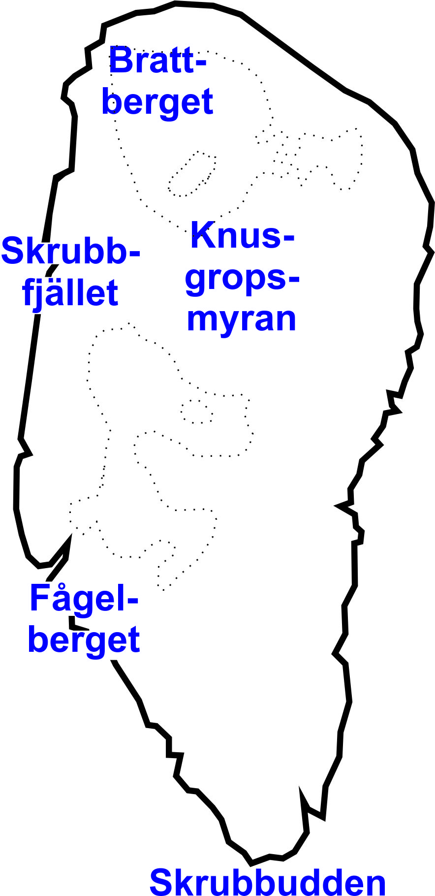 Skiss över Skrubban